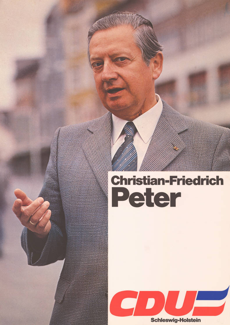 Christian-Friedrich Peter CDU Schleswig-Holstein Abbildung: Foto Plakatart: Kandidaten-/Personenplakat mit Porträt Auftraggeber: Verantw.: CDU Schleswig-Holstein Objekt-Signatur: 10-012 : 448 Bestand: Landtagswahlplakate Schleswig-Holstein (10-012) GliederungBestand10-18: Landtagswahlplakate Schleswig-Holstein (10-012) » Landtagswahl am 29.4.1979 » Ankündigungsplakate Lizenz: KAS/ACDP 10-012 : 448 CC-BY-SA 3.0 DE